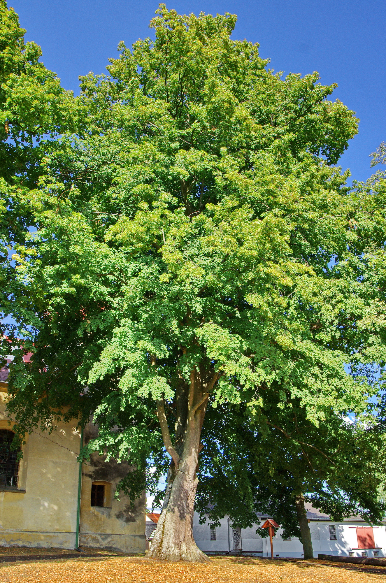 Památný strom Lípa u kostela v Trstěnicích, Trstěnice, okres Cheb